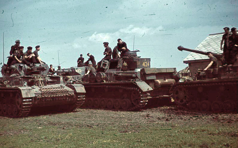 Deutsche Panzer in Bereitschaft vor dem Angriff, Ukraine, Sommer 1941